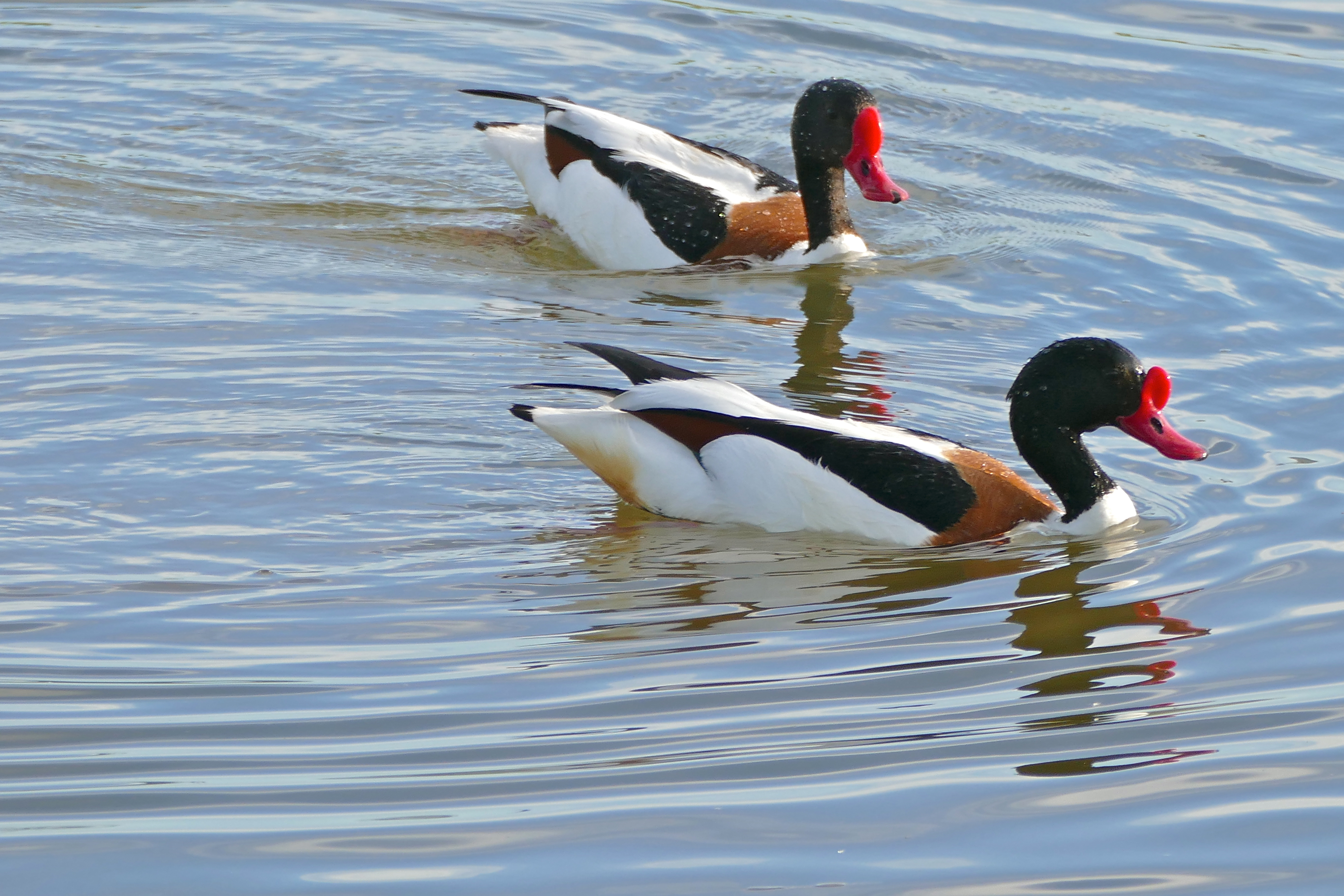 Aguait de les Gantes, Estany del Cortalet, Los Aiguamolls del' Empordà, Castelló d'Empúries, Catalunya, SPAIN